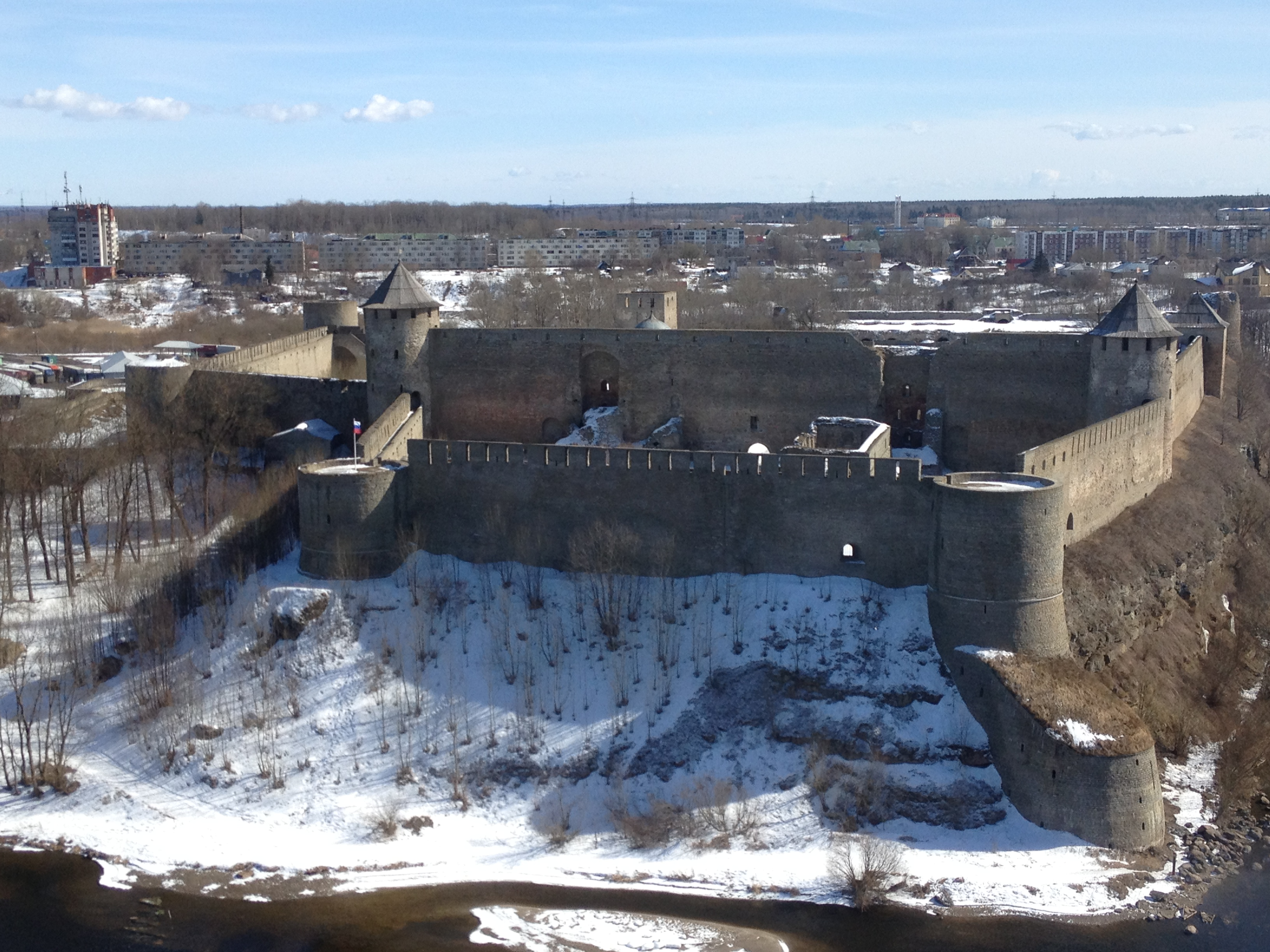 Крепость Ивангород (Санкт-Петербург и Лен.область, Ивангород, Девичья Гора)